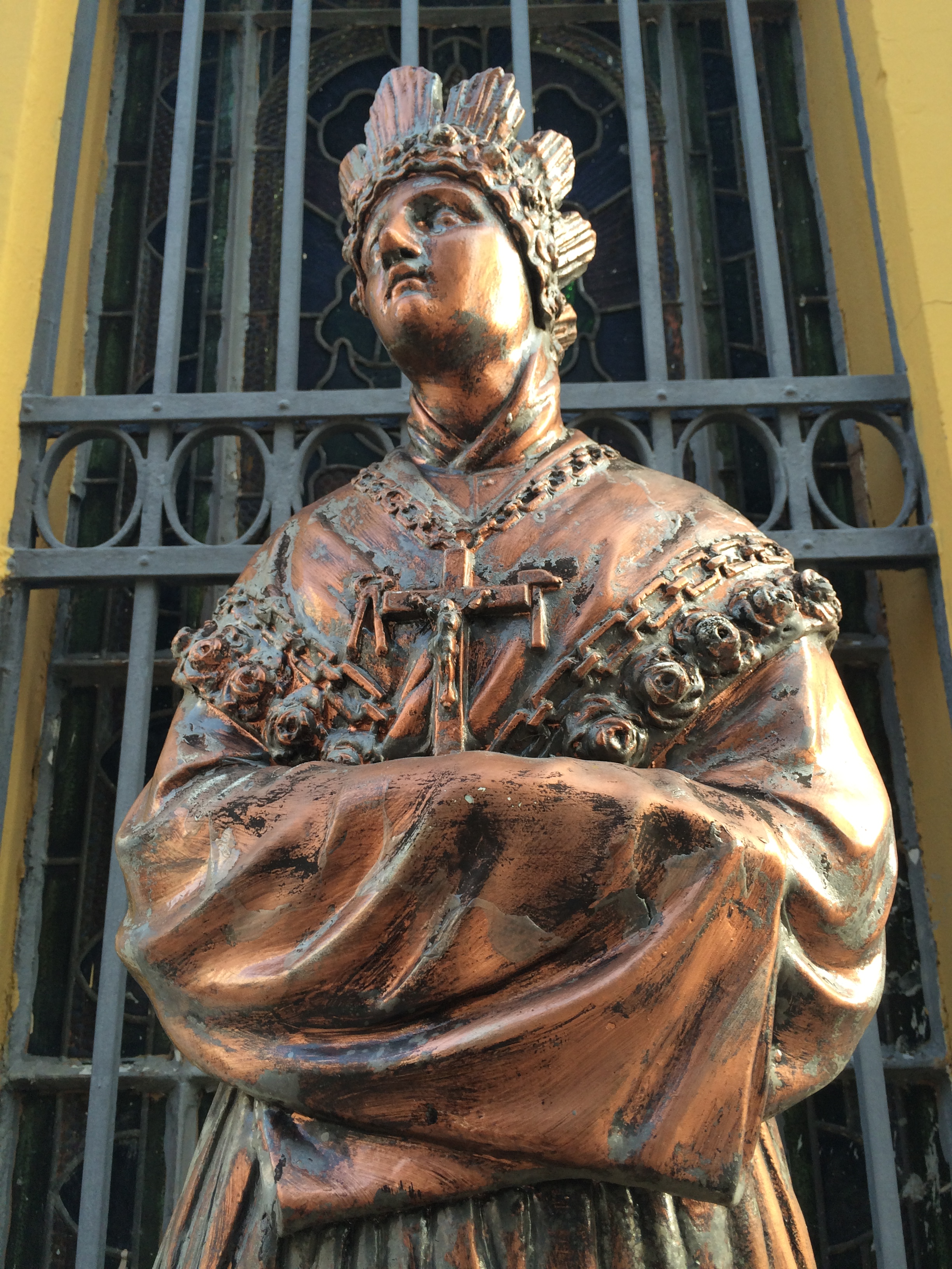 Detalhe da imagem de Nossa Senhora da Salette